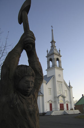 Église de St-Adrien